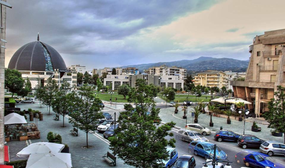 Scorcio di Via Rossini e sullo sfondo il Municipio di Rende e la Chiesa San Carlo Borromeo nell'area urbana di Cosenza.